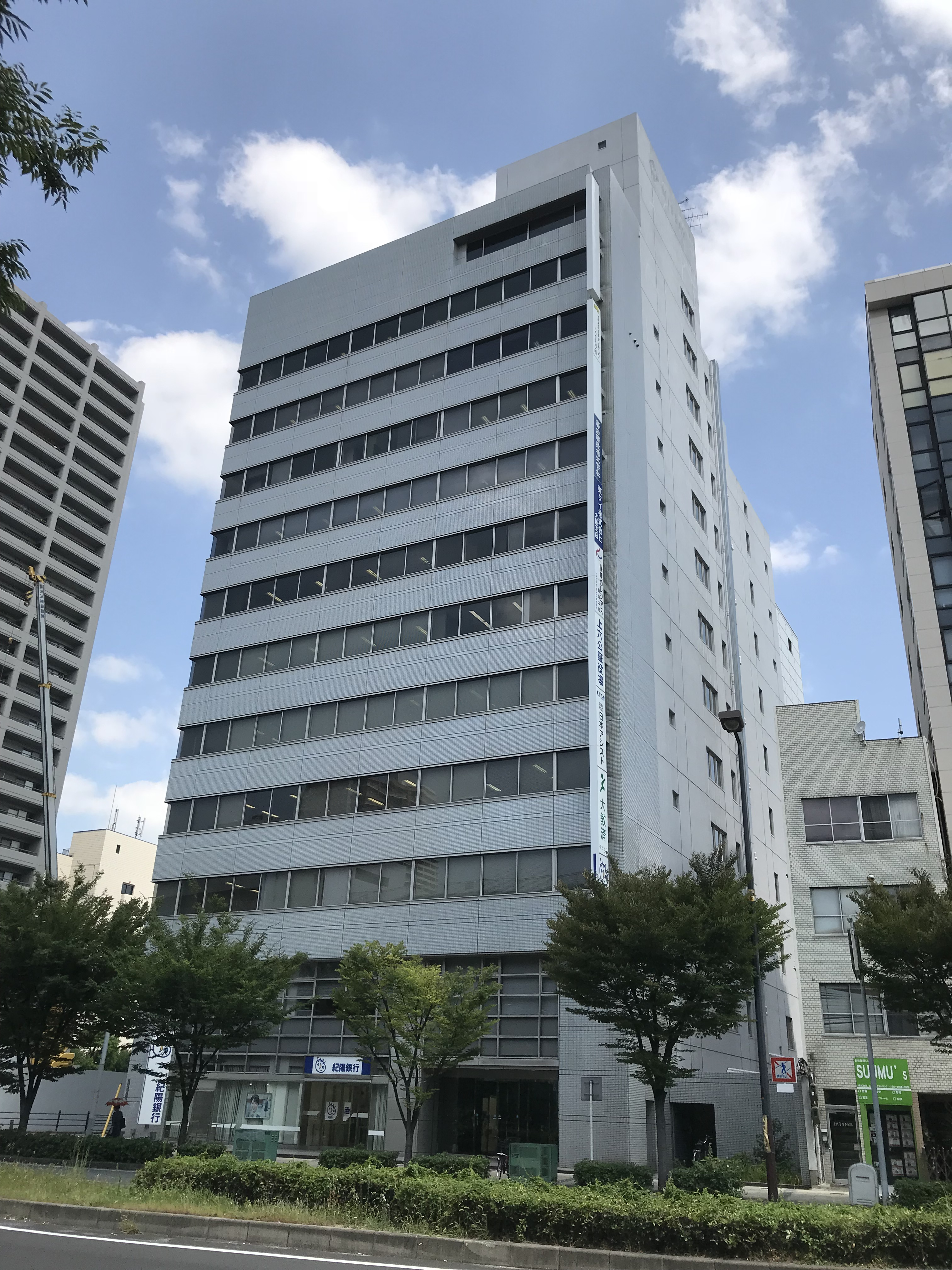 本社事務所のあるサムティ上本町ビル